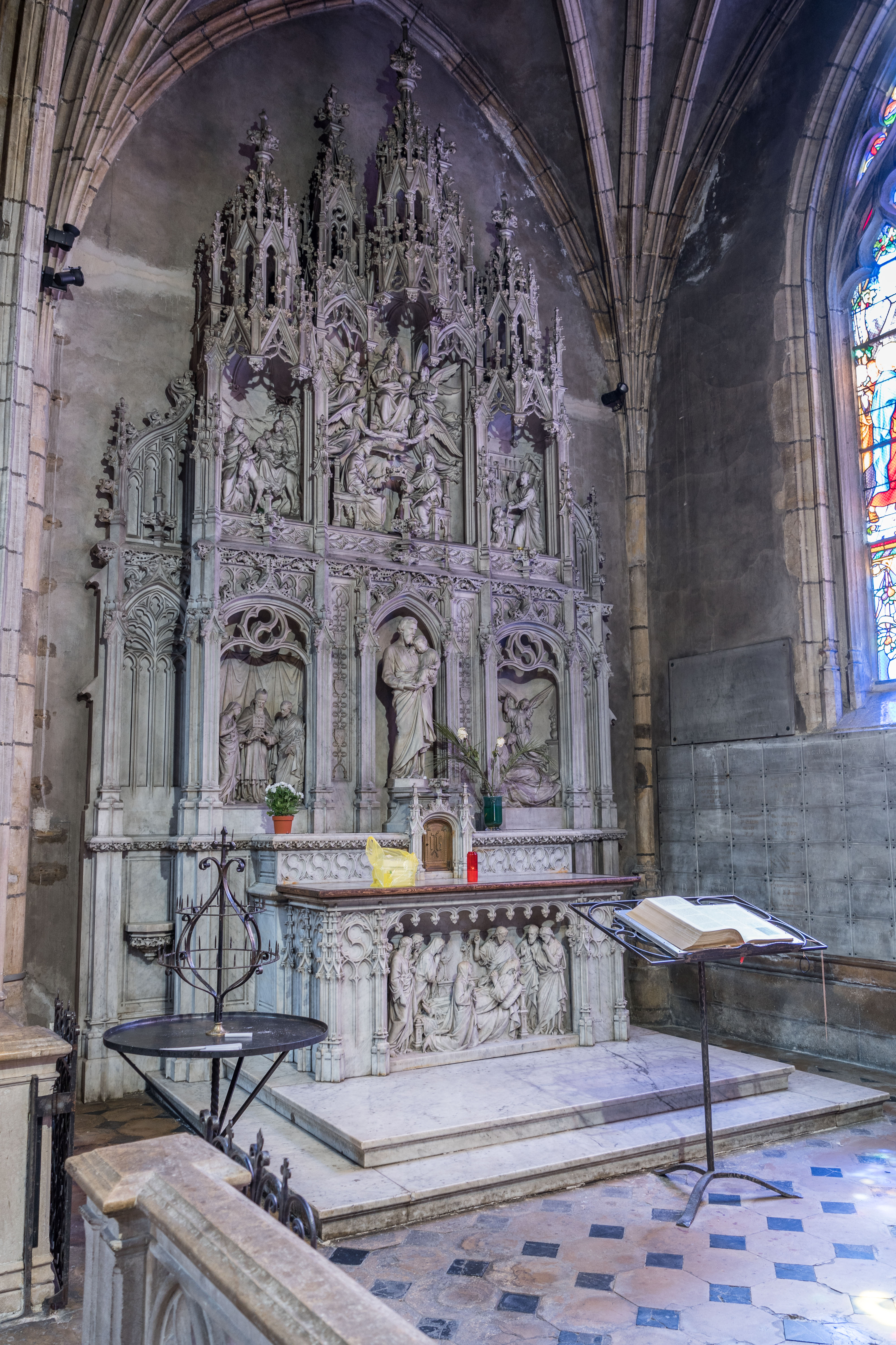 Lyon - église Saint-Bonaventure - Retable avec autel de la chapelle Saint-Joseph